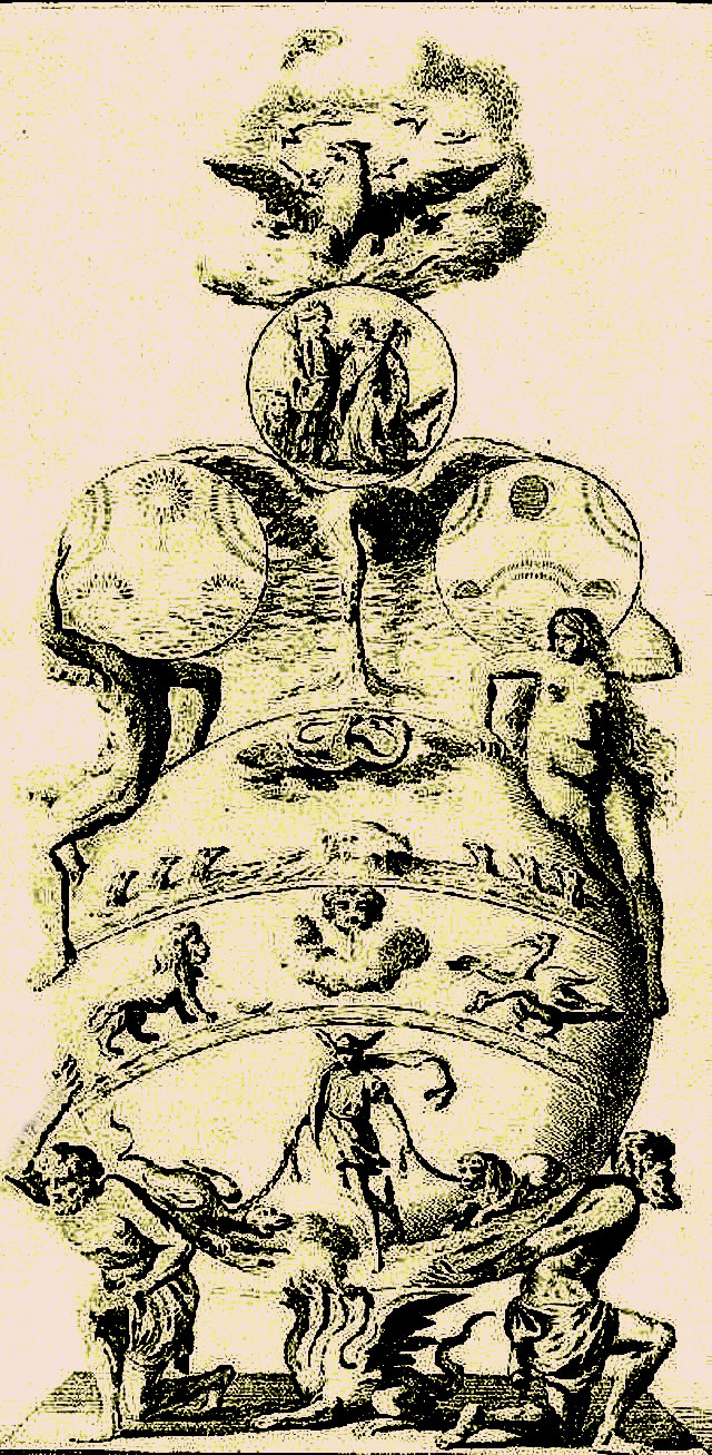 Représentation du Grand oeuvre par Dom Pernety dans son Dictionnaire Mytho-Hermétique,1758